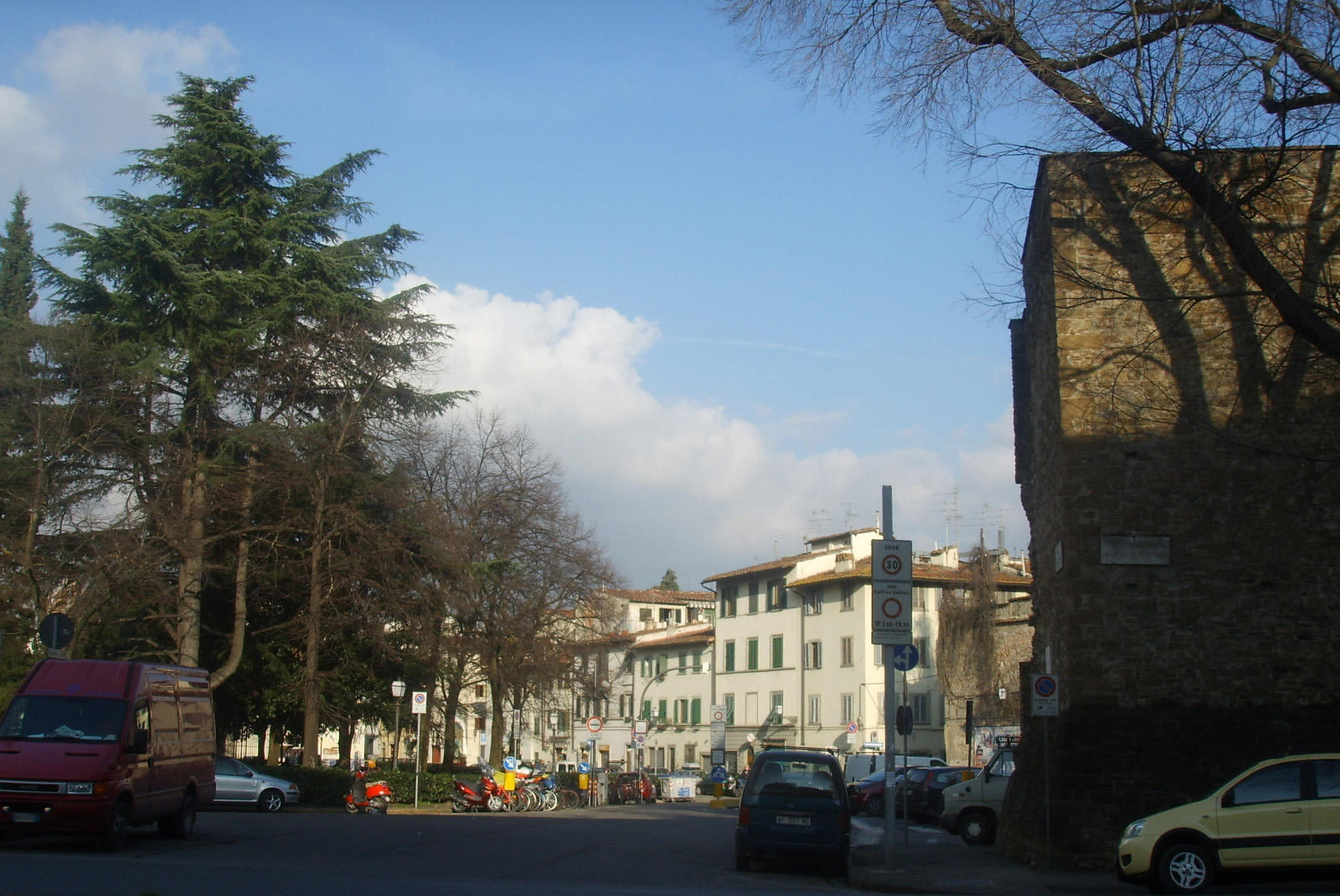 Piazza Tasso in Florence